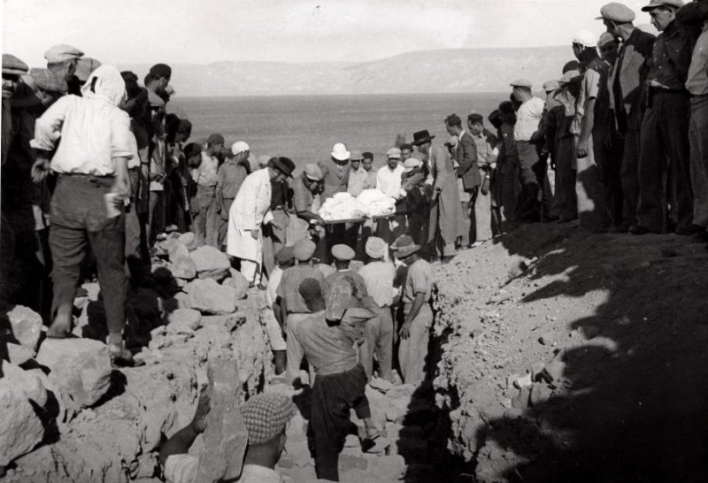 Tiberias